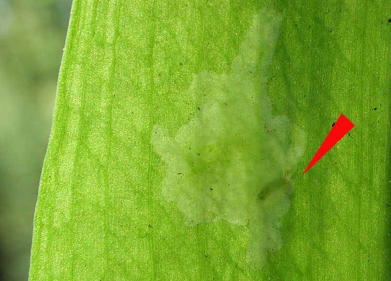 Cheilosia fasciata, larve in Bärlauch, Frankfurt/M., Germany